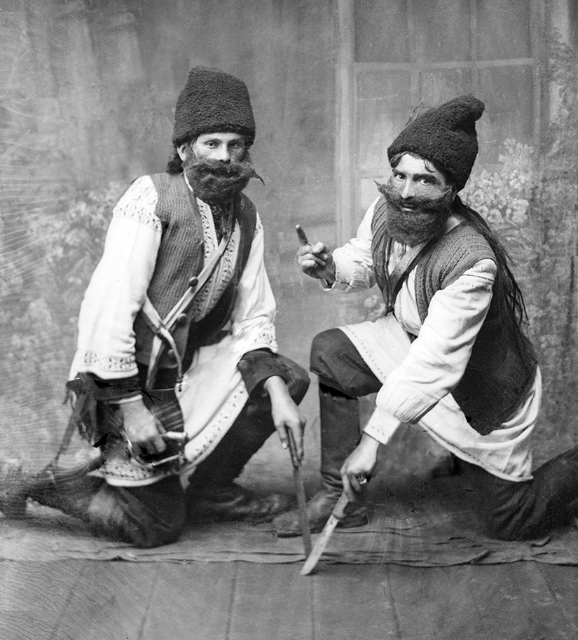 Doi călușari